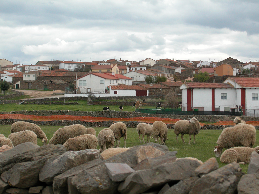 Diego Alvaro (Ávila, Castilla y León).